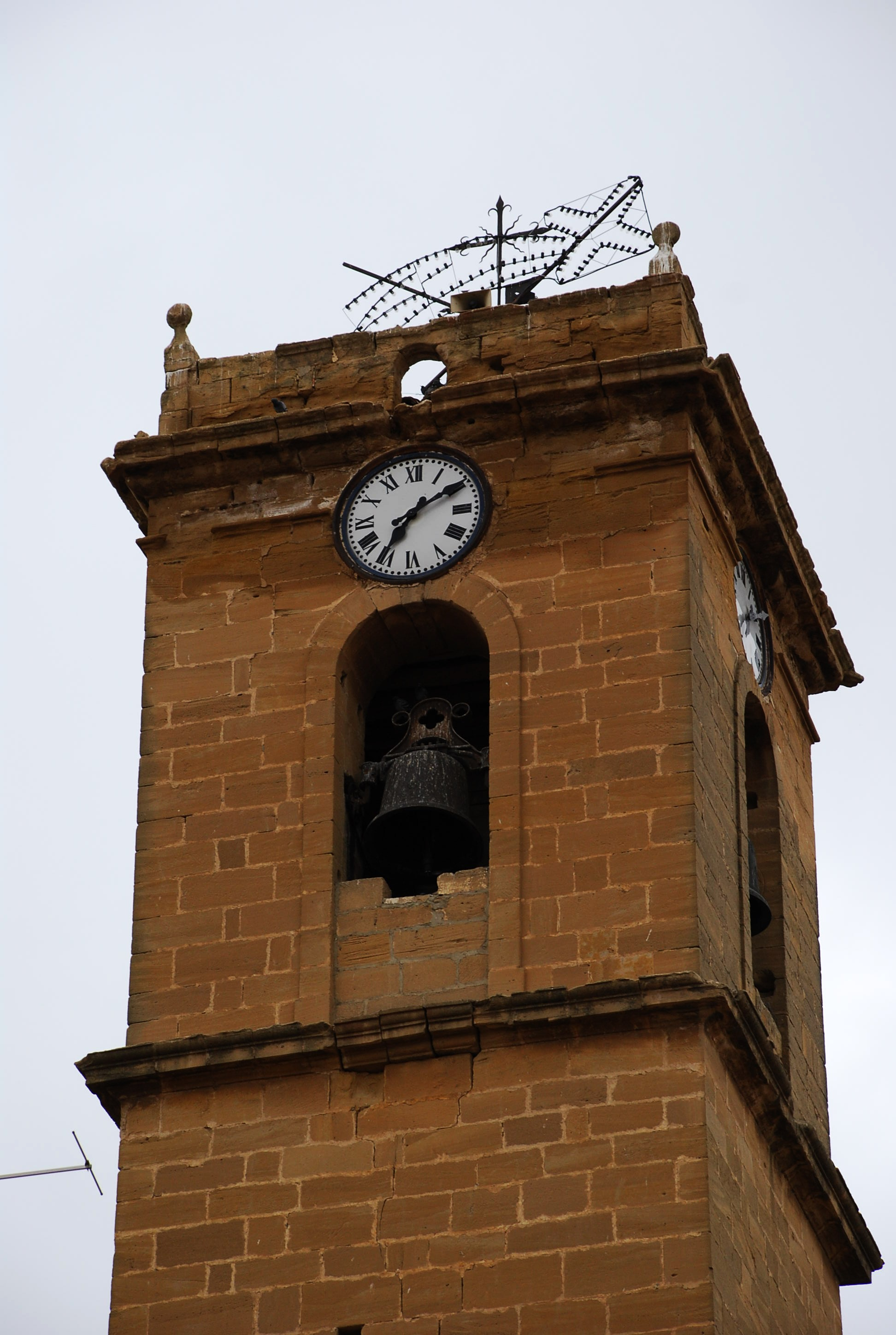 Torre de la iglesia de San Martín en Casalarreina, La Rioja (España).